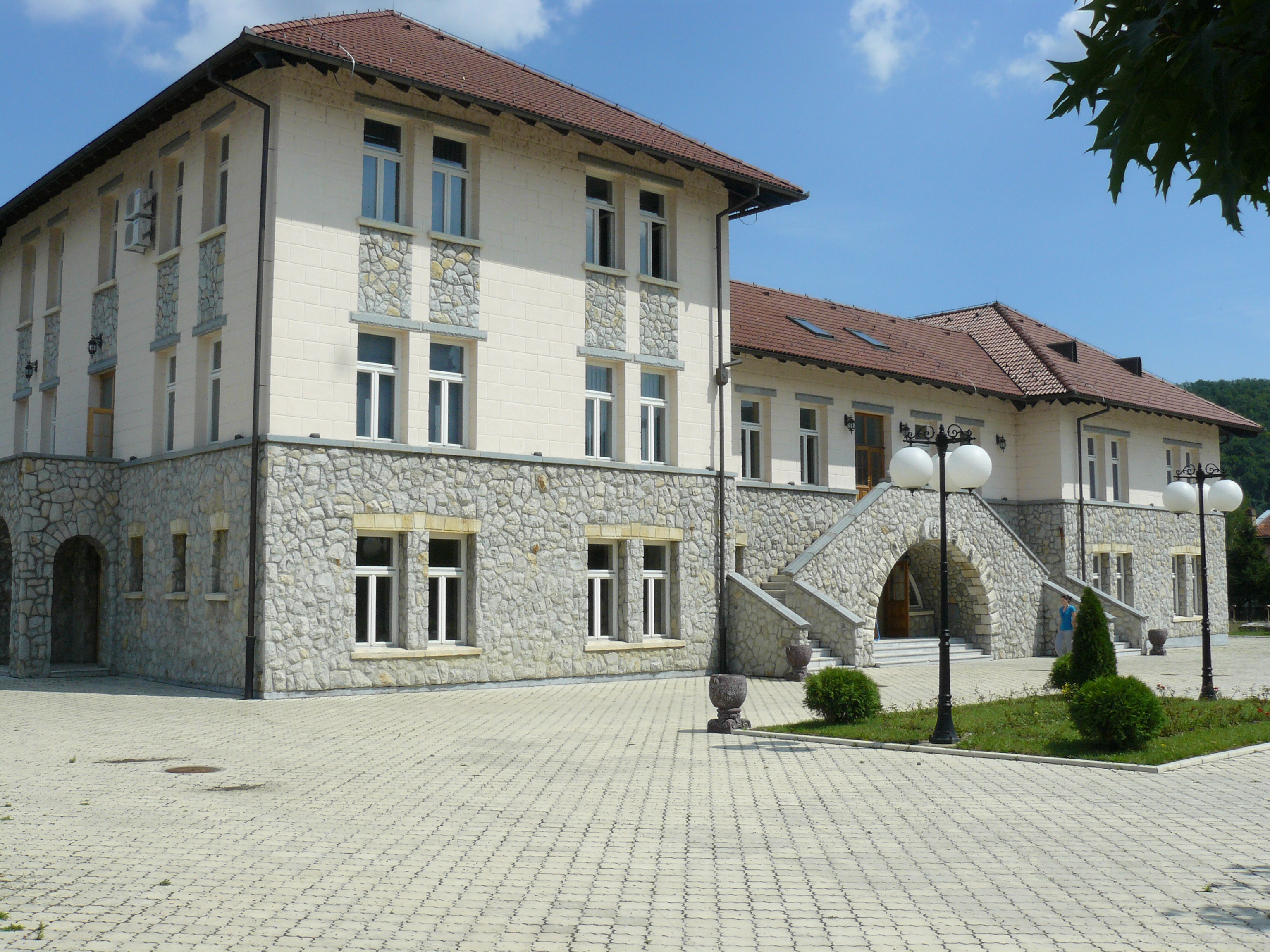 Centar za kulturu Filip Višnjić Ugljevik